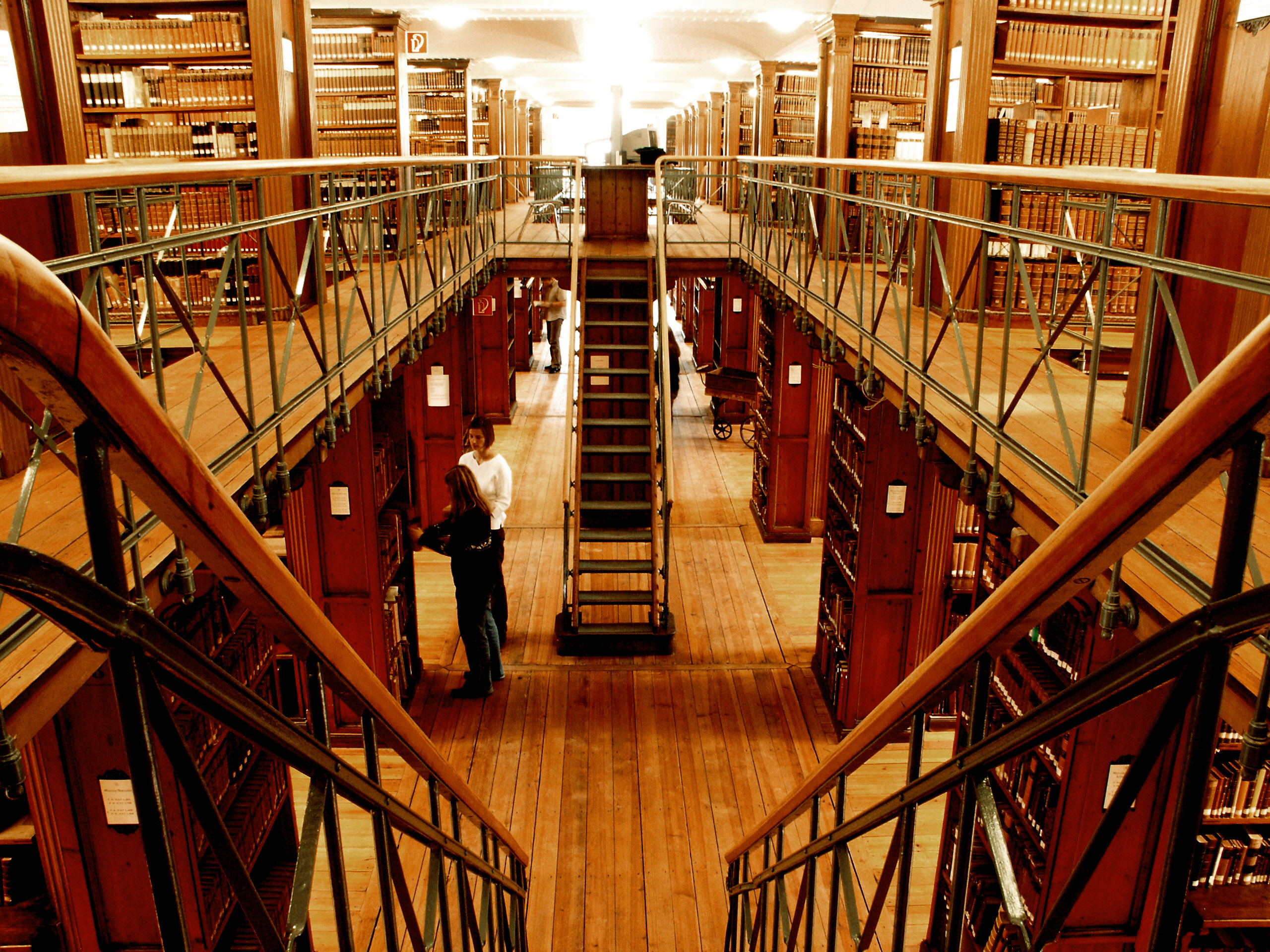 Forschungsbibliothek der Niedersächsischen Staats- und Universitätsbibliothek Göttingen